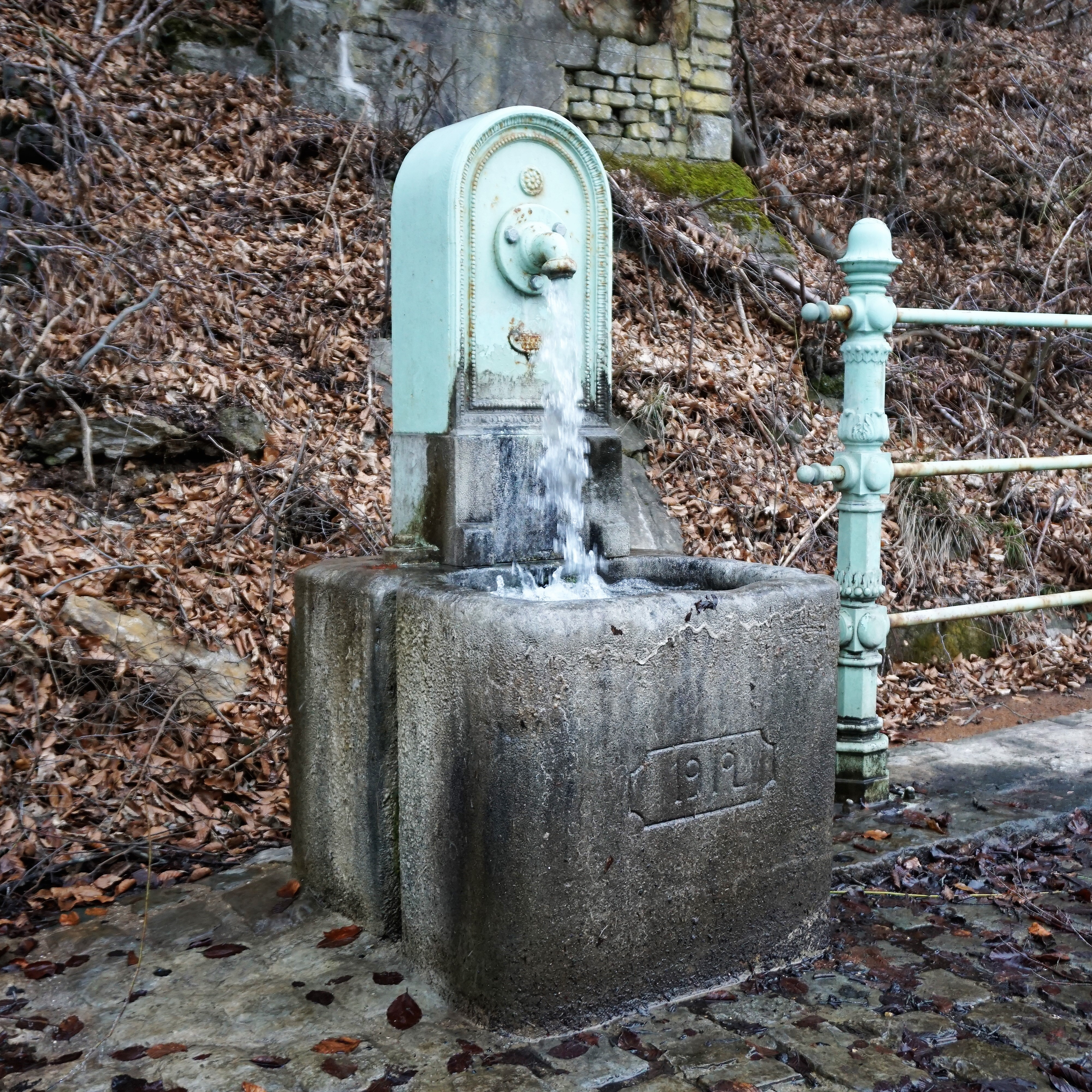 Luxembourg, fontaine Dauschbur.